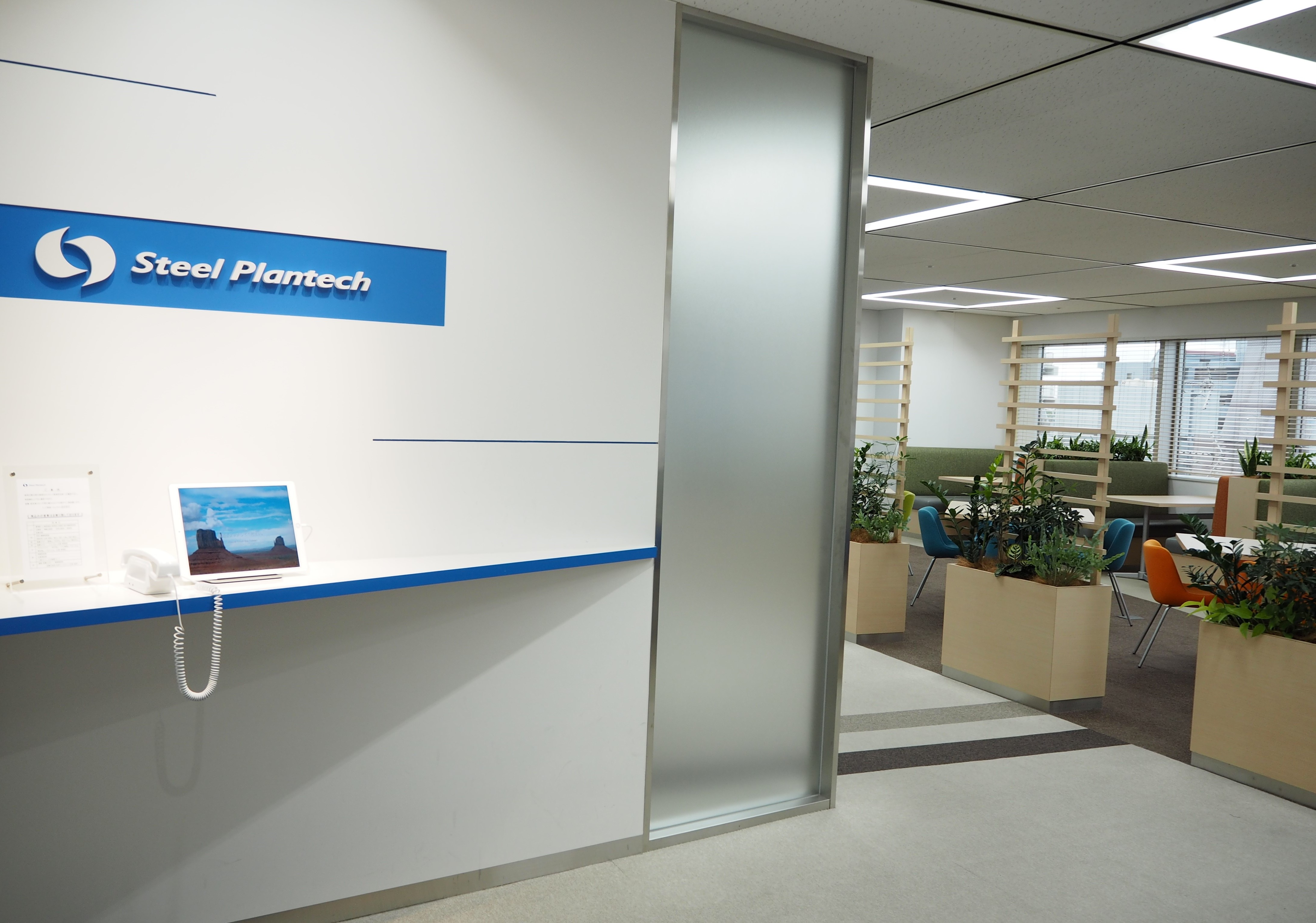 本社エントランス